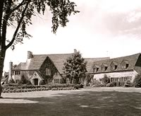 La photo représente le Manoir Beaubois, vers les années 1929-1930. Le Manoir sera à l'origine du collège Beaubois.